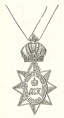 Scan van Blz. 286 van het boek "Handbuch der Ritter- und Verdienstorden " uitgegeven 1893 door Weber.Tekening van de in 1902 overleden Maximilian Gritzner. Robert Prummel 10 jul 2008 16:40 (CEST)